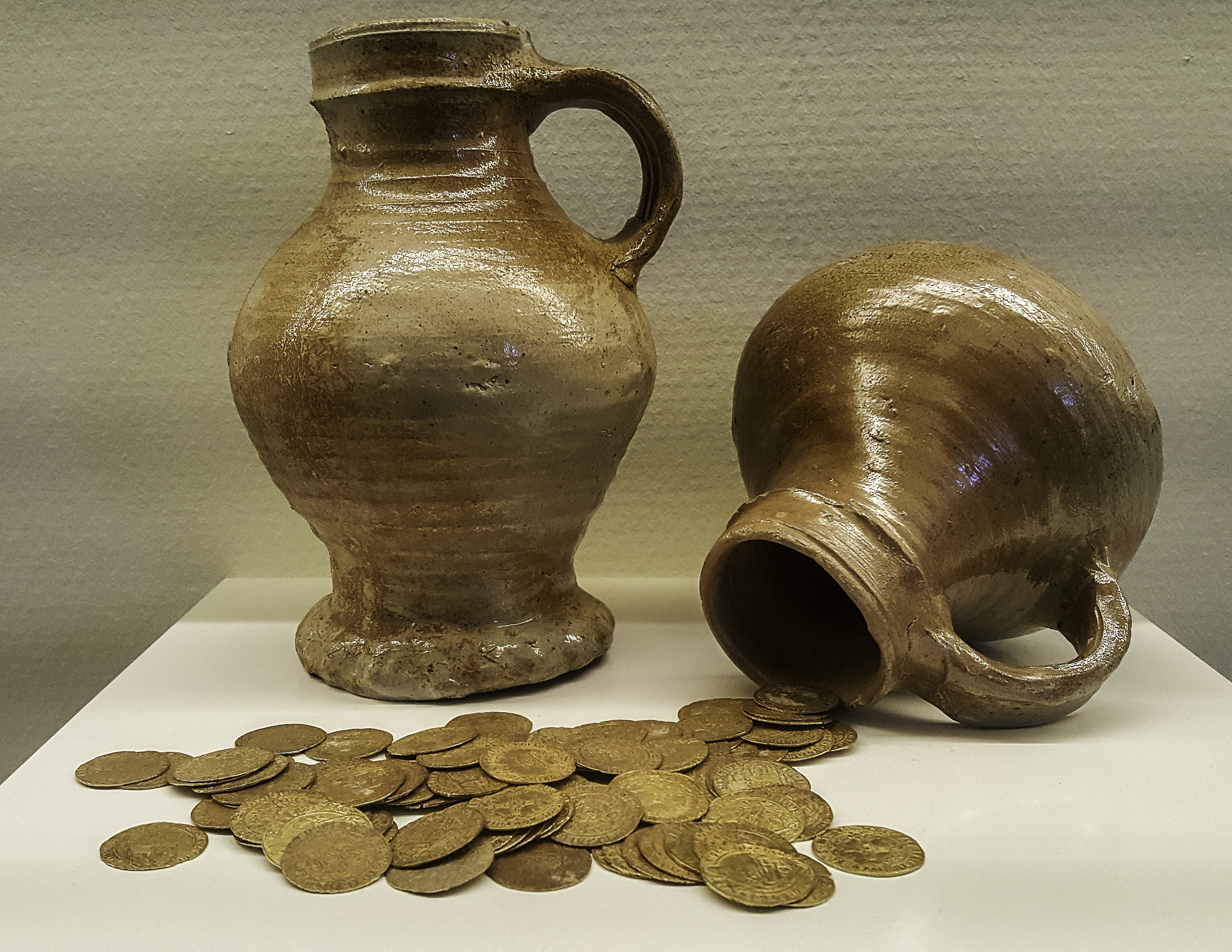 De goudschat van Feerwerd in het Groninger Museum